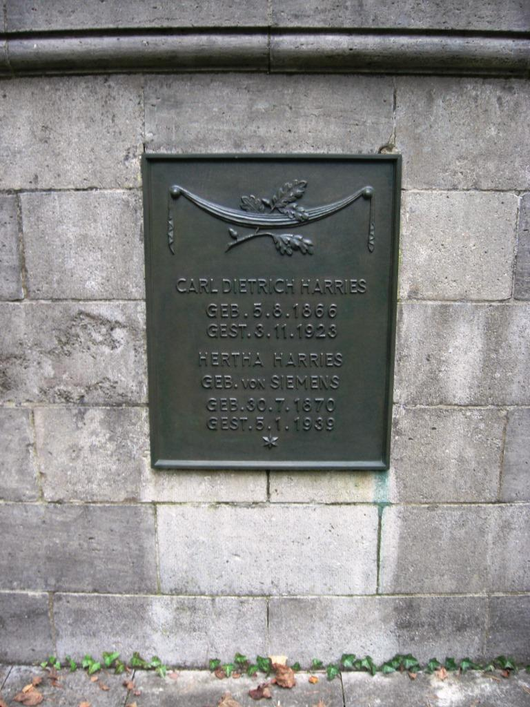 Grab des Chemikers Carl Dietrich Harries (1866-1923) auf dem Südwestkirchhof in Stahnsdorf